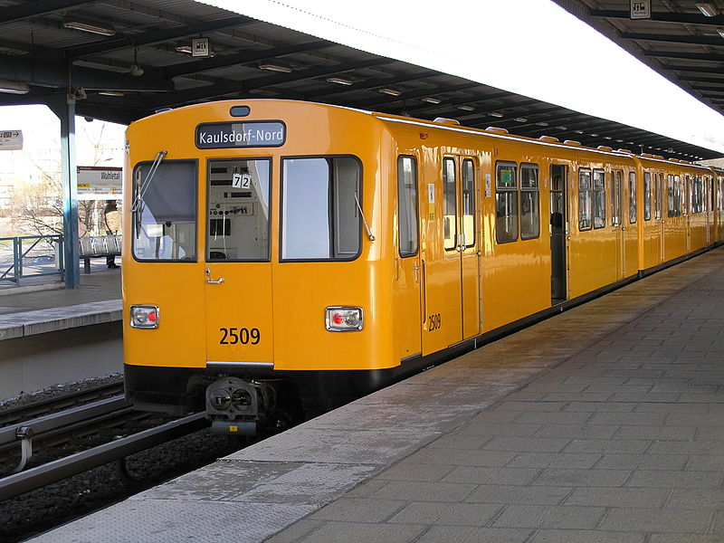 El tren Nº2509-2510 está en Wuhletal, estación ubicada en el sector este de Berlín, en donde hacen combinación las líneas S5 y U5.